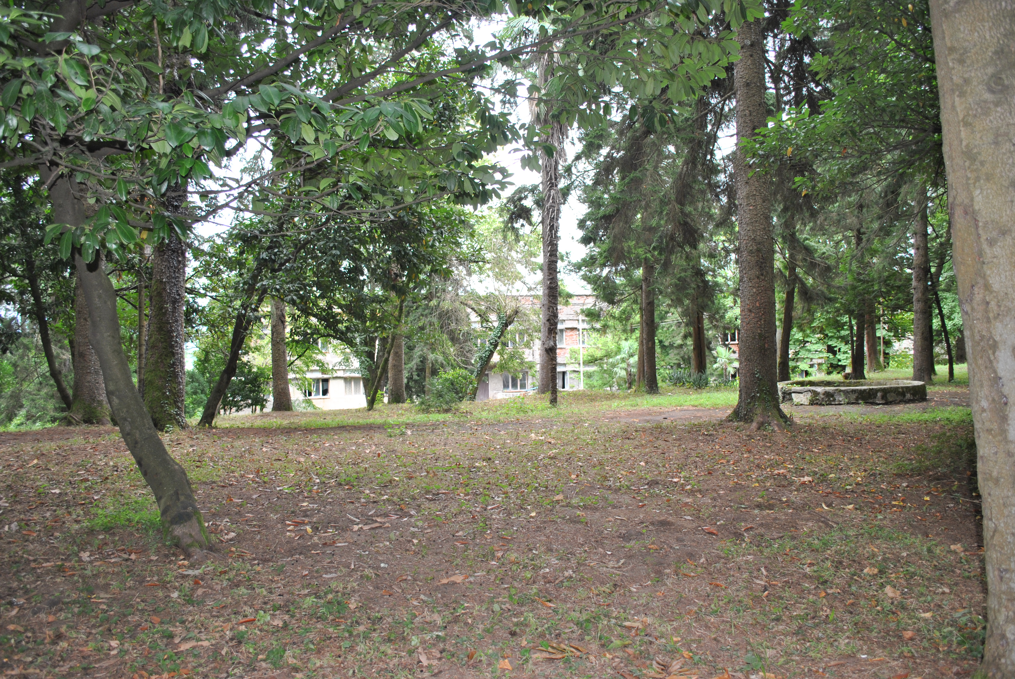 გორა ბერეჟოულის ყოფილი სსასოფლო სამეურნეო ტექნიკუმი